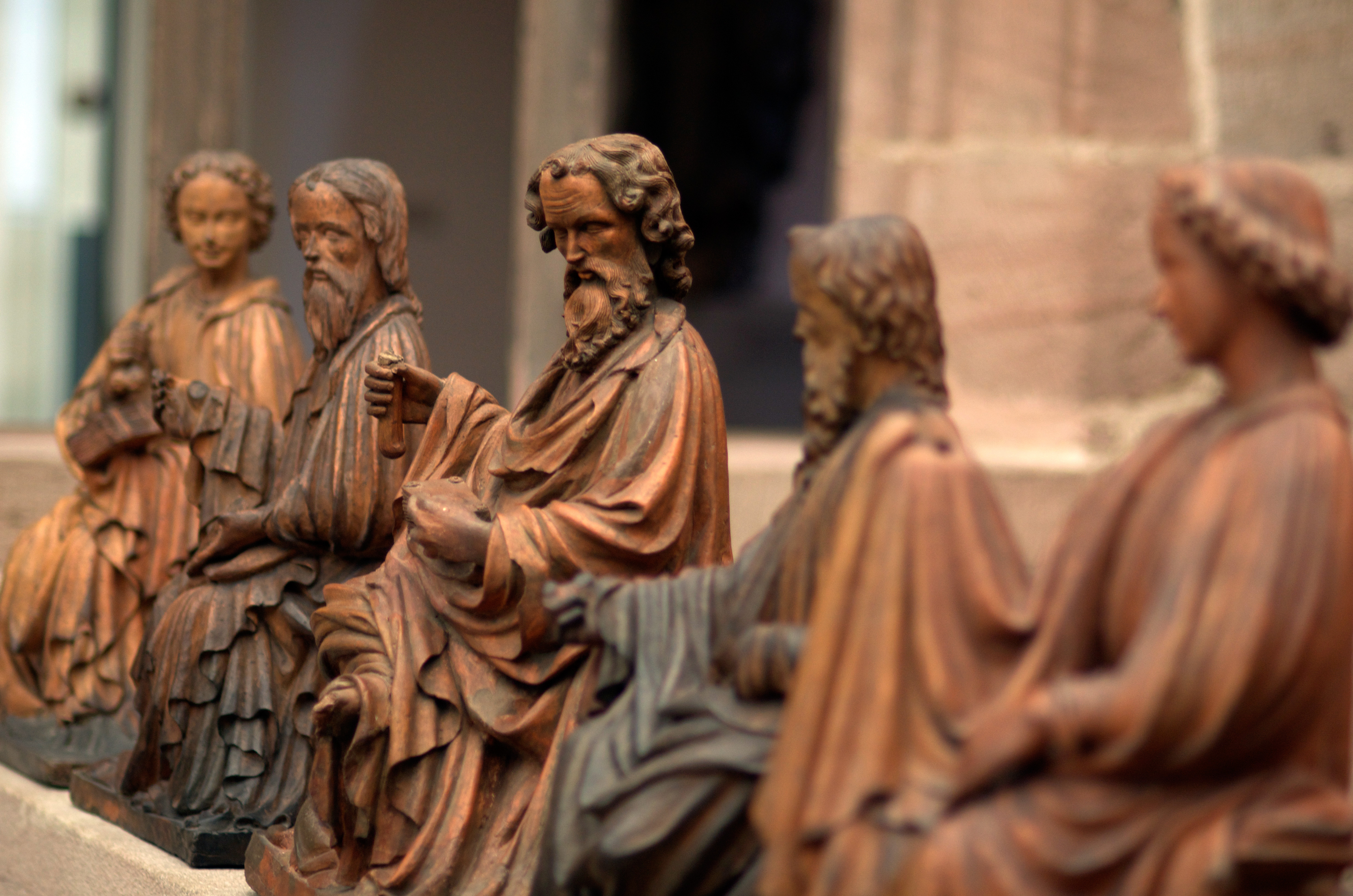 Tonapostel. Nürnberg um 1400, Germanisches Nationalmuseum Nürnberg (Pl.O.232)